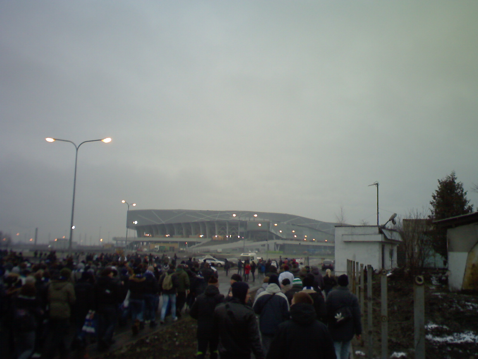 Арена Львів. Перед матчем Карпати-Динамо 10 грудня 2011 року